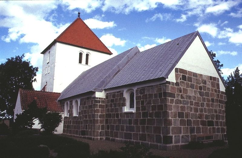 Hvidbjerg Kirke, set fra sydøst; Skive Kommune, Denmark